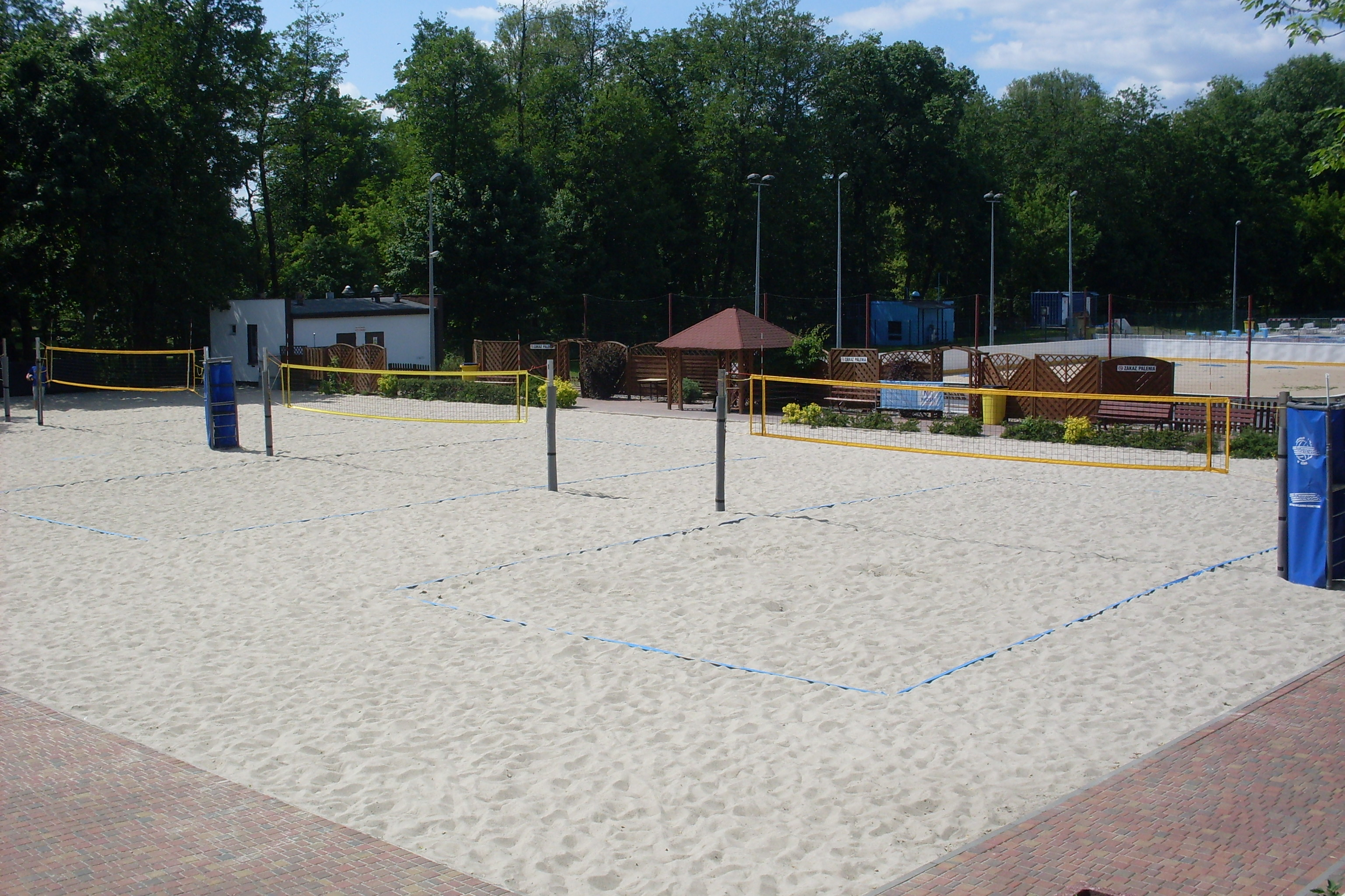 Piłka plażowa na basenie 2